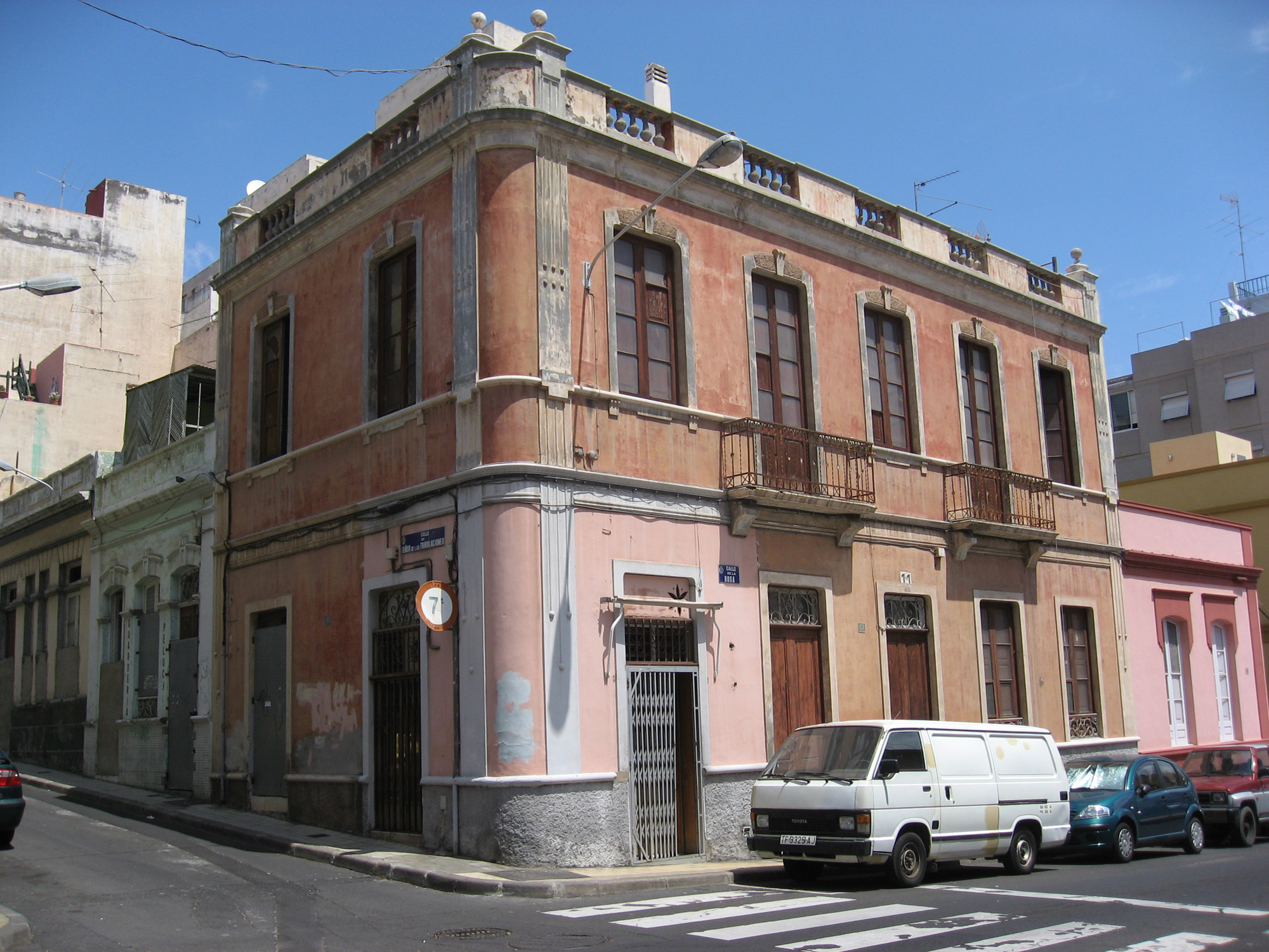 Una de las calles de El Toscal